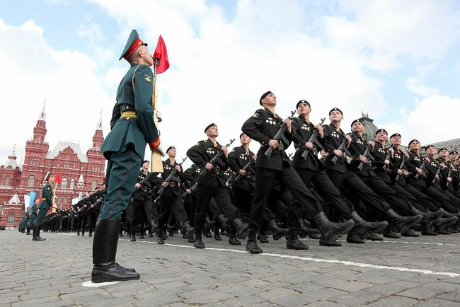 Военный парад, посвящённый 66-й годовщине Победы в Великой Отечественной войне.